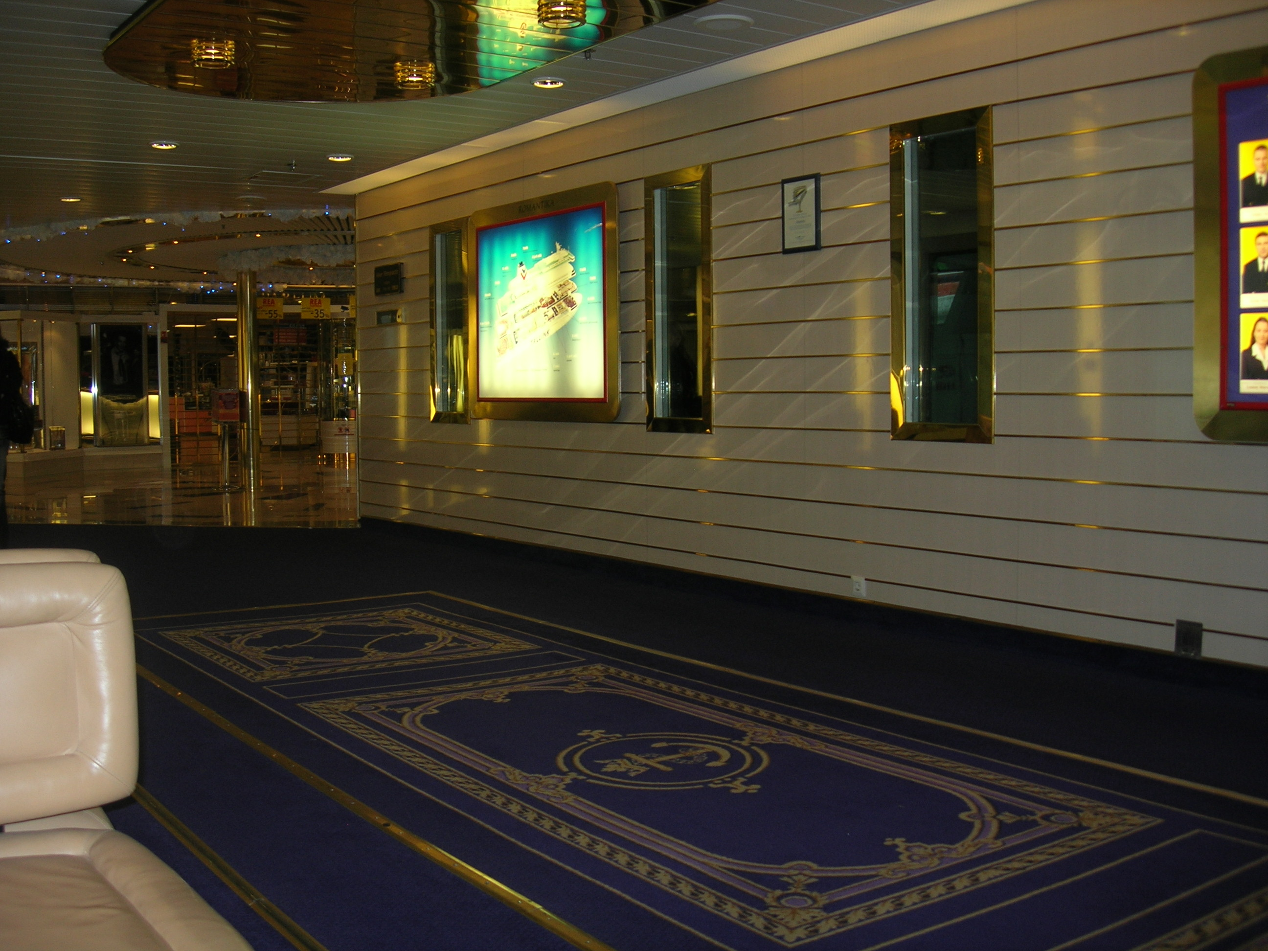 Tallink